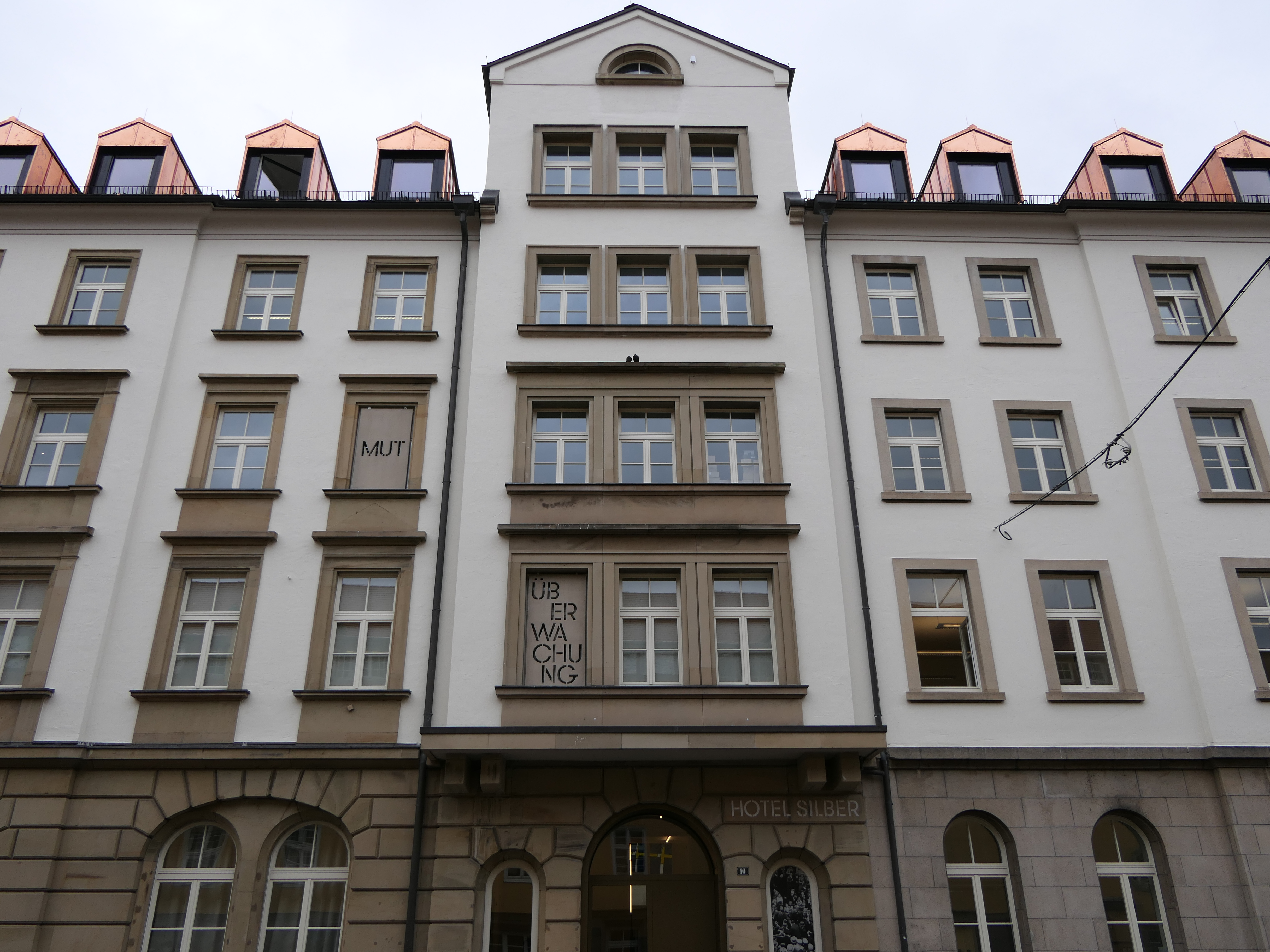 Das Hotel Silber nach seinem Umbau. Frontseite, mittlerer Gebäudeteil.